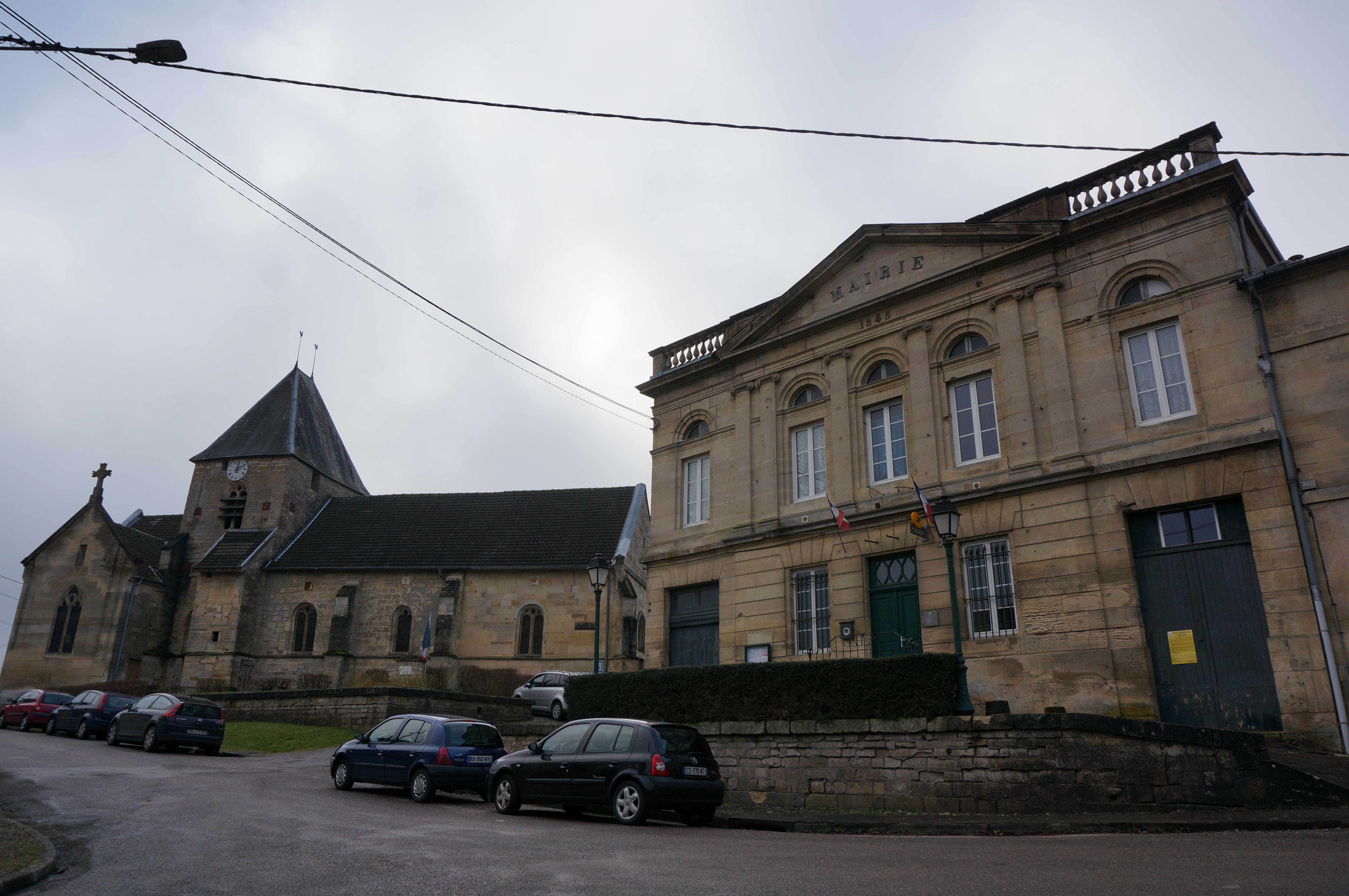 vues de Saudrupt.